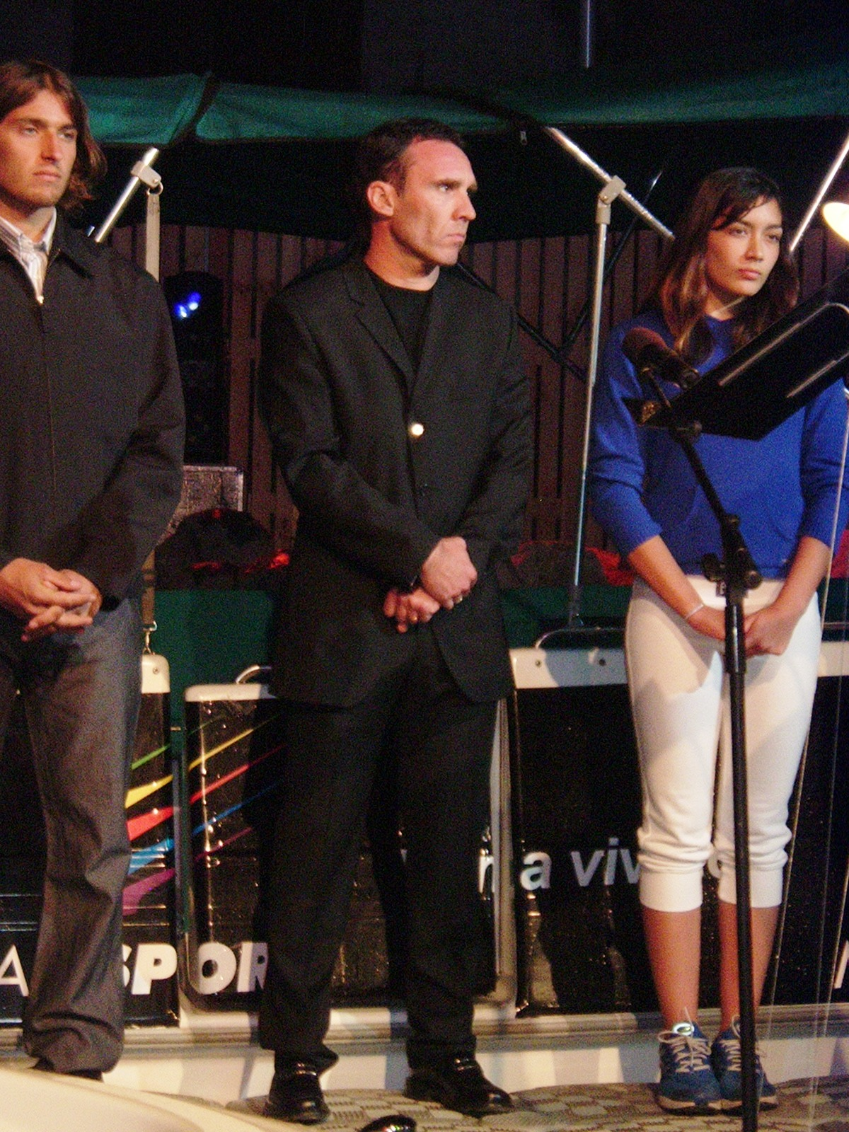 Marcelo Espina en la inauguración de MallSport.